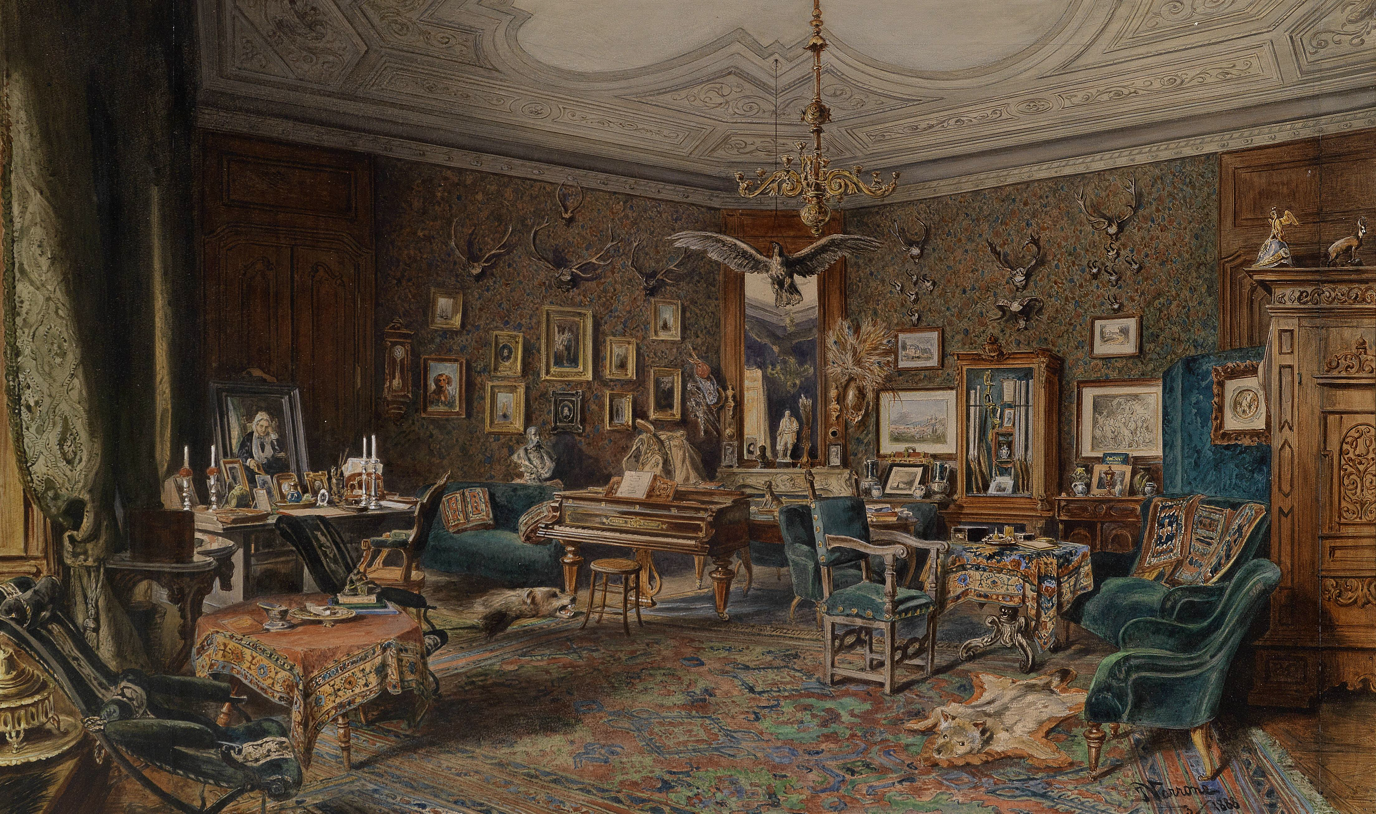 Herrschaftliches Interieur mit Jagdtrophäen an der Wand